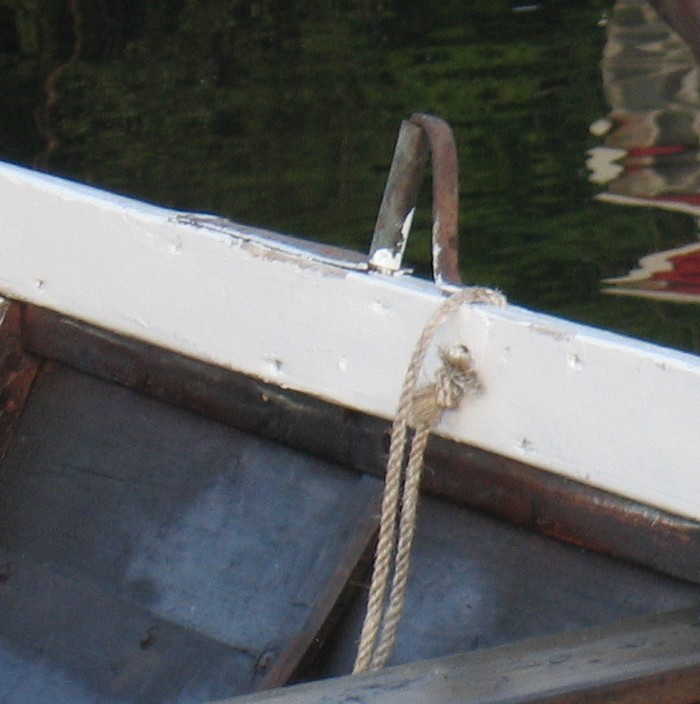 Keip med keipsnev av jarn